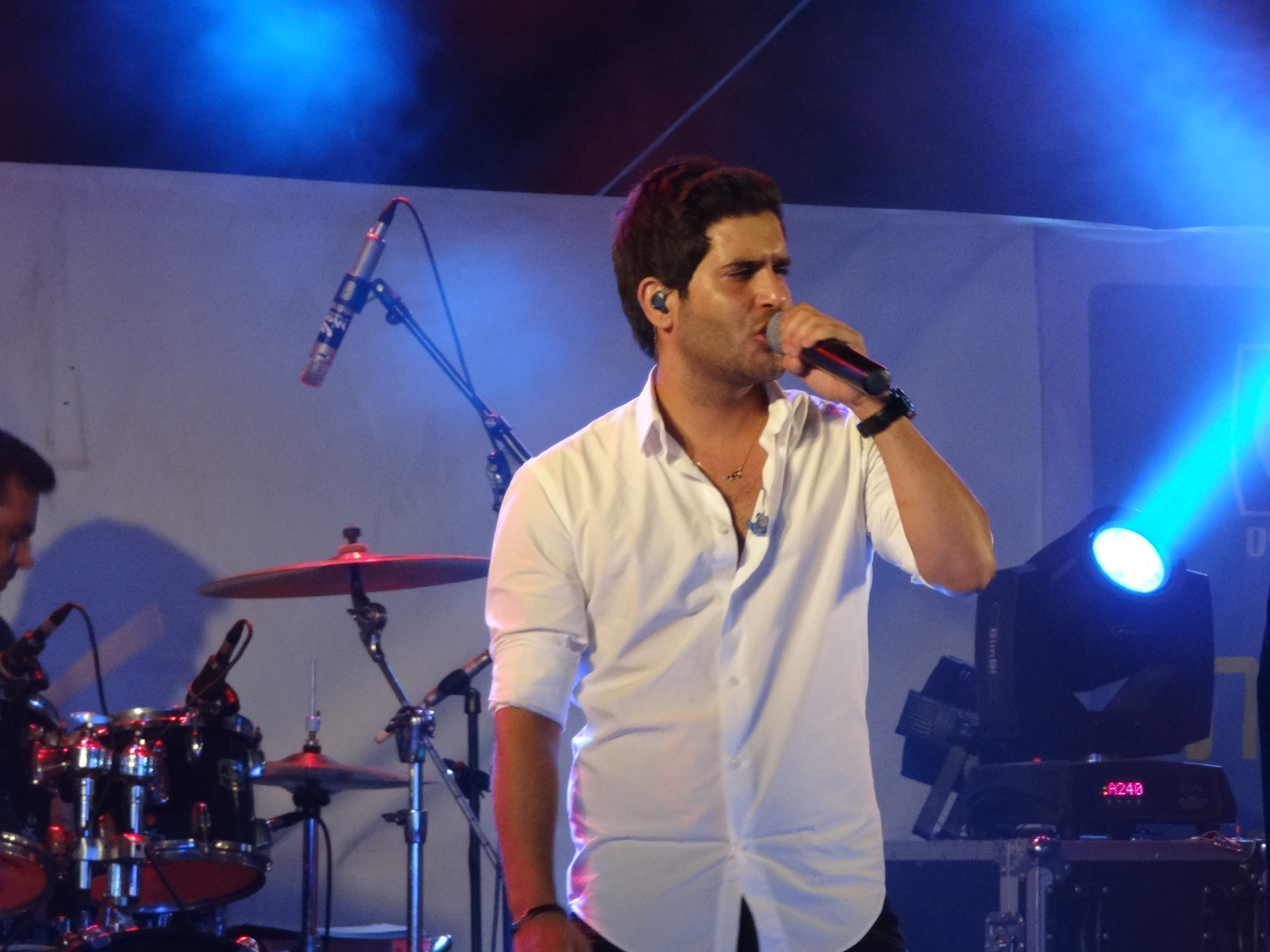 הזמר פאר טסי בהופעה בעיר הנוער 2014 בעיר נשר